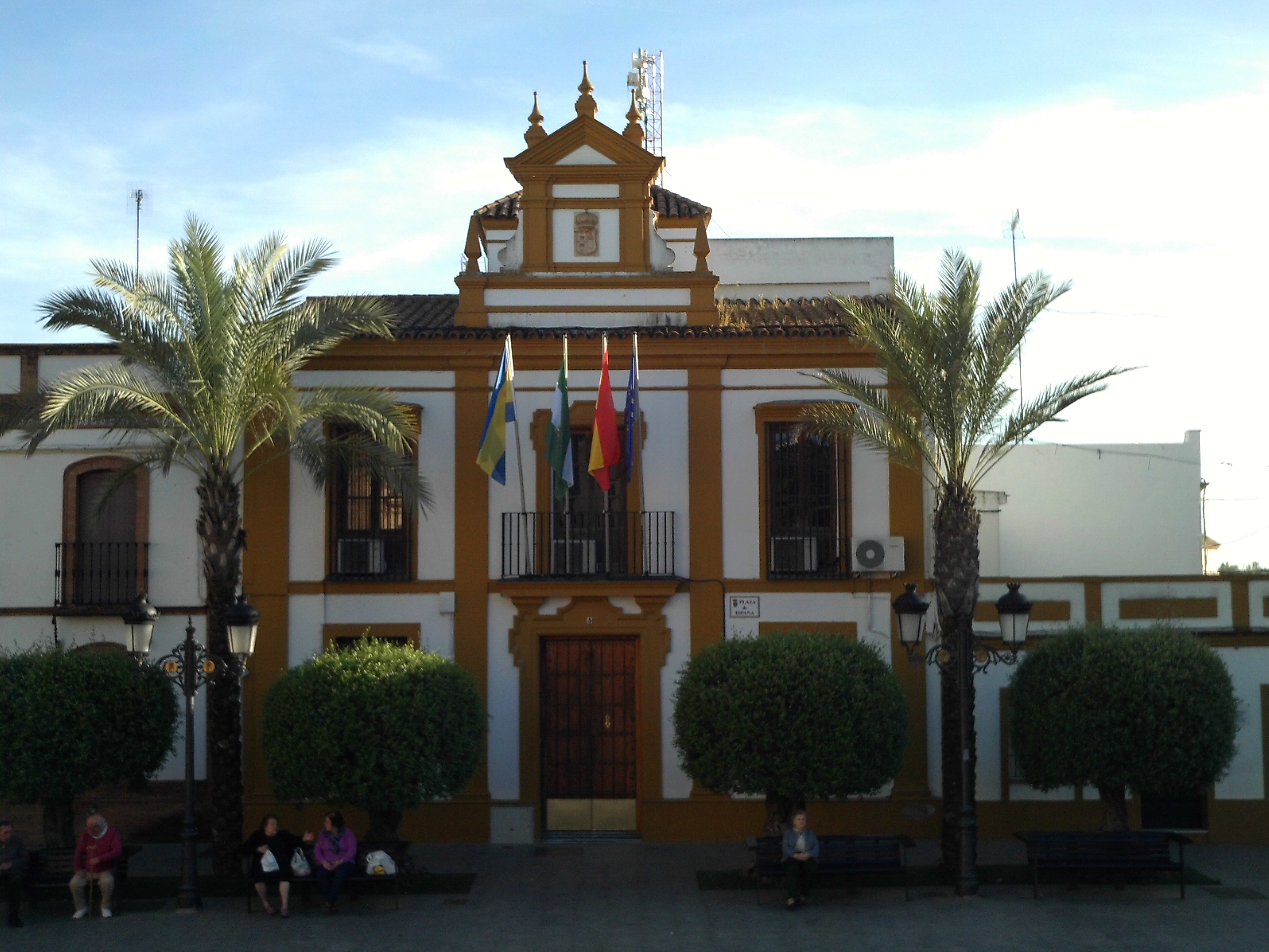 Ayuntamiento de Gines, provincia de Sevilla, Andalucía, España.